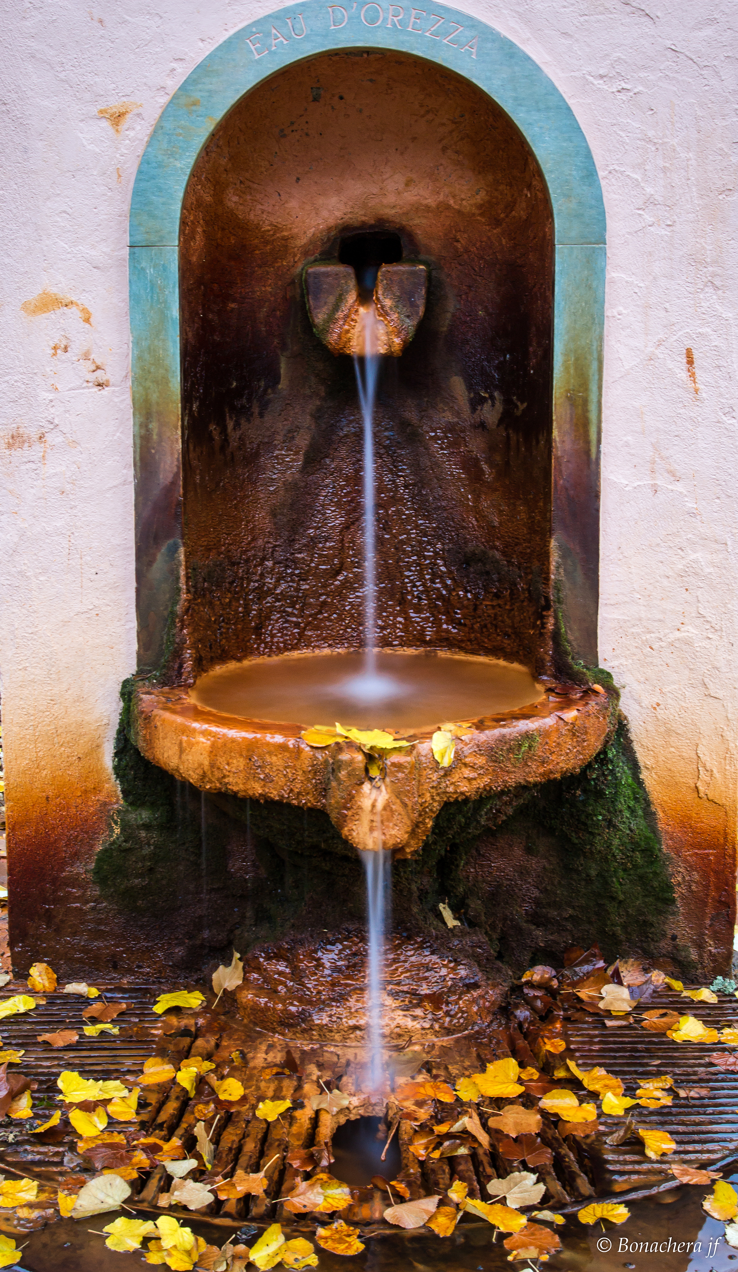 Rapaggio, Castagniccia (Corse) - Fontaine offerte par M.Mora pour les visiteurs des Eaux d'Orezza.